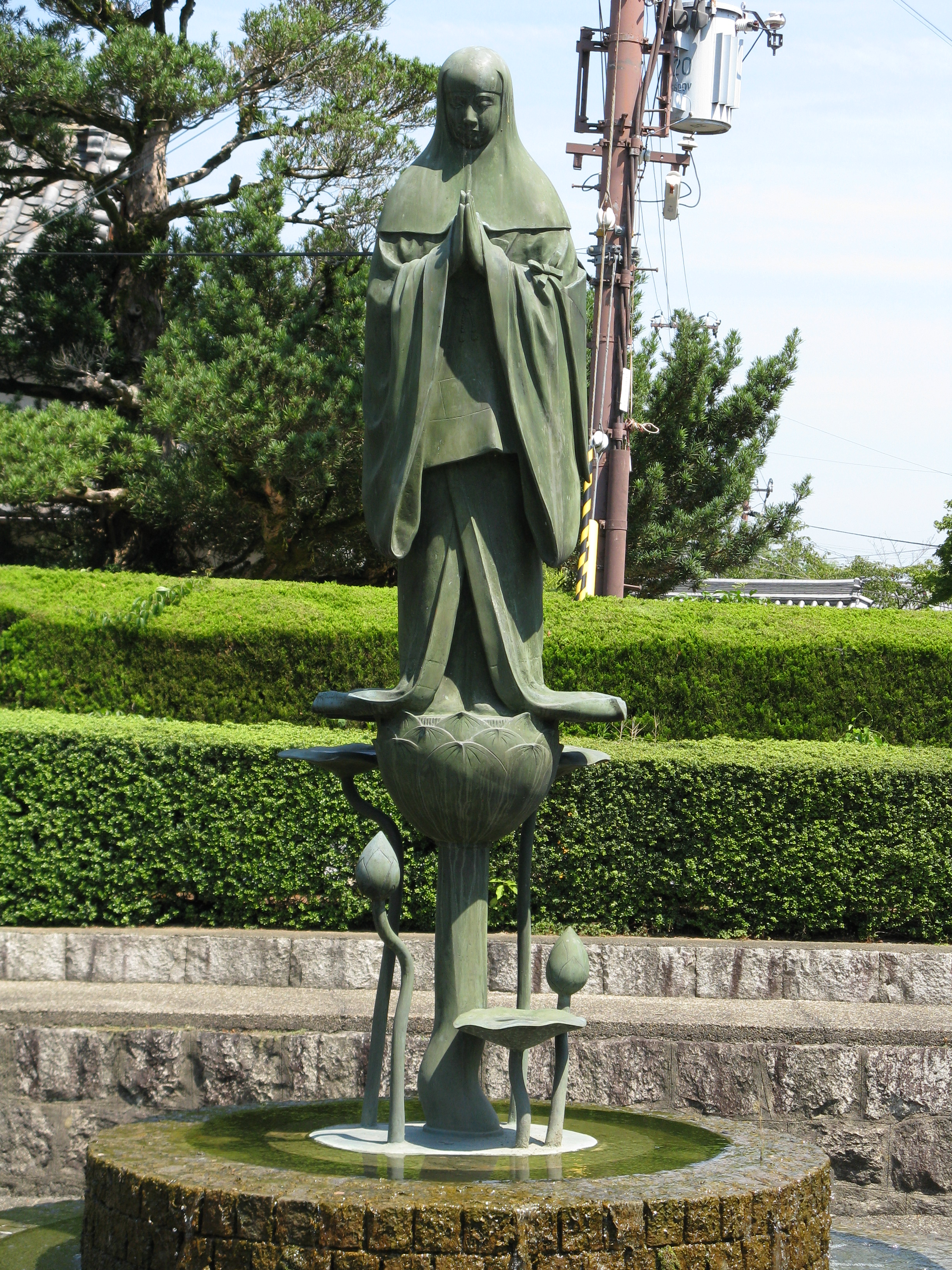 當麻寺 中将姫像